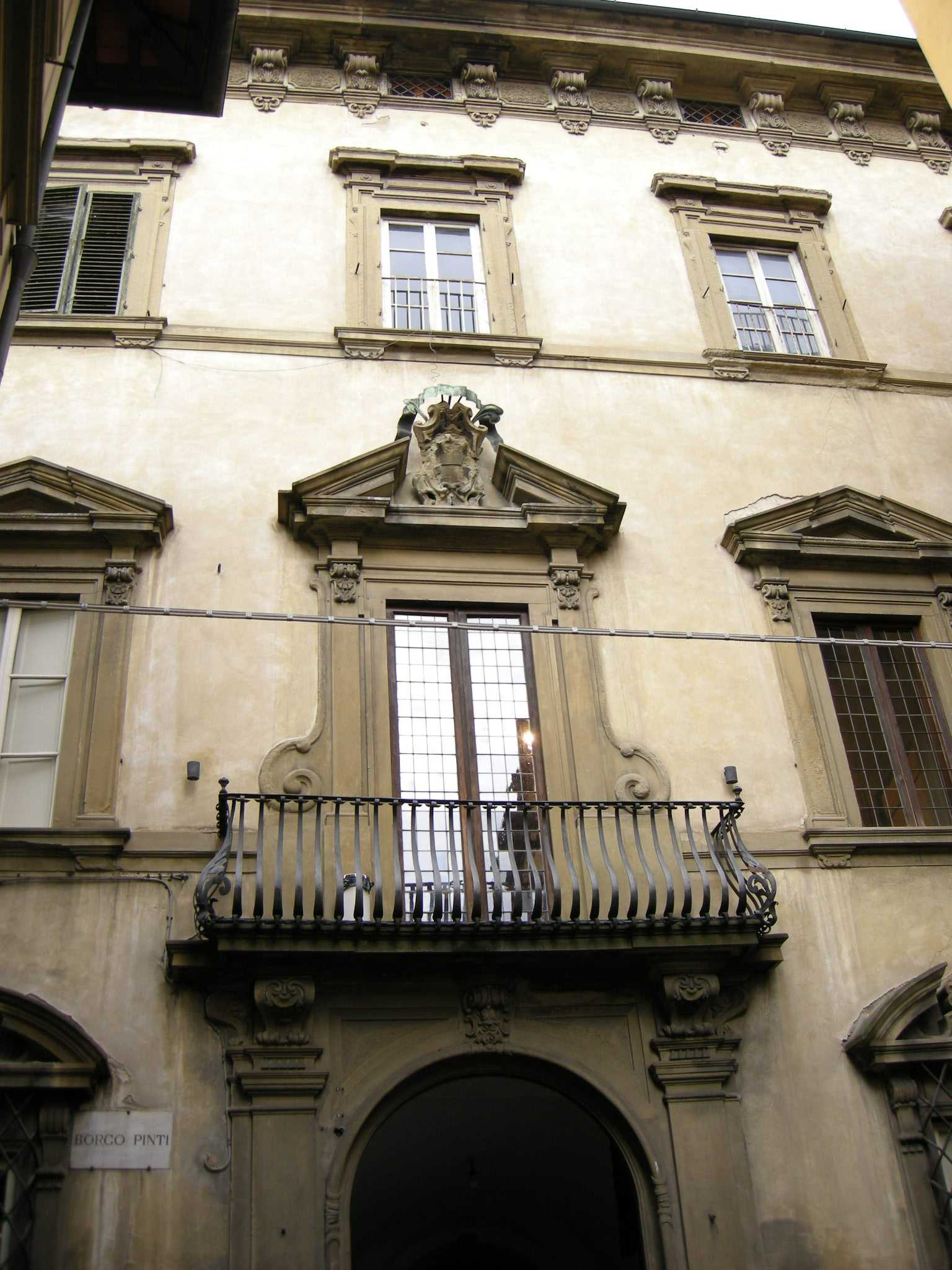 Palazzo Roffia, esterno